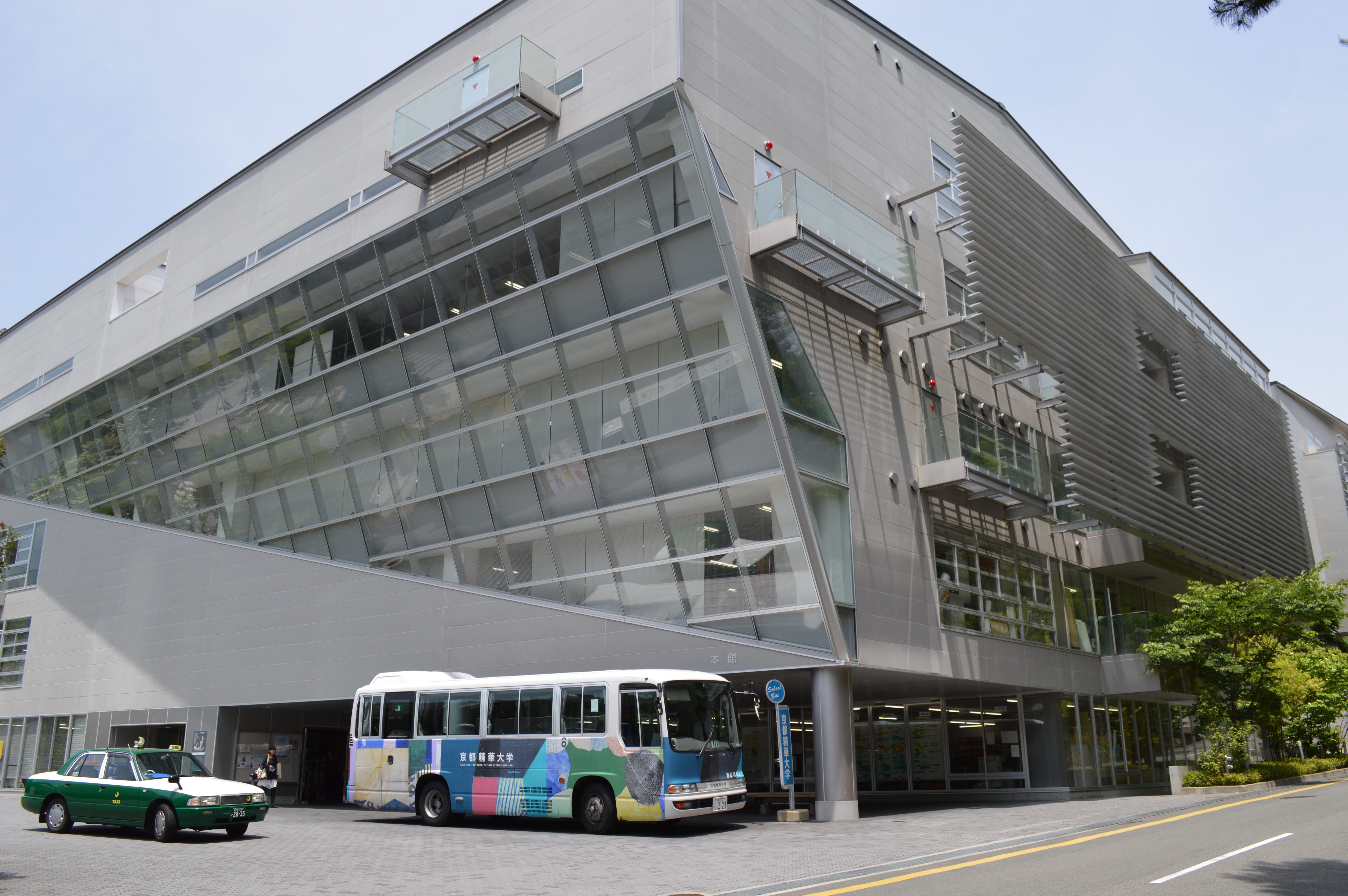 京都市左京区岩倉 京都精華大学 本館とスクールバス（京都市営地下鉄烏丸線国際会館駅行き）